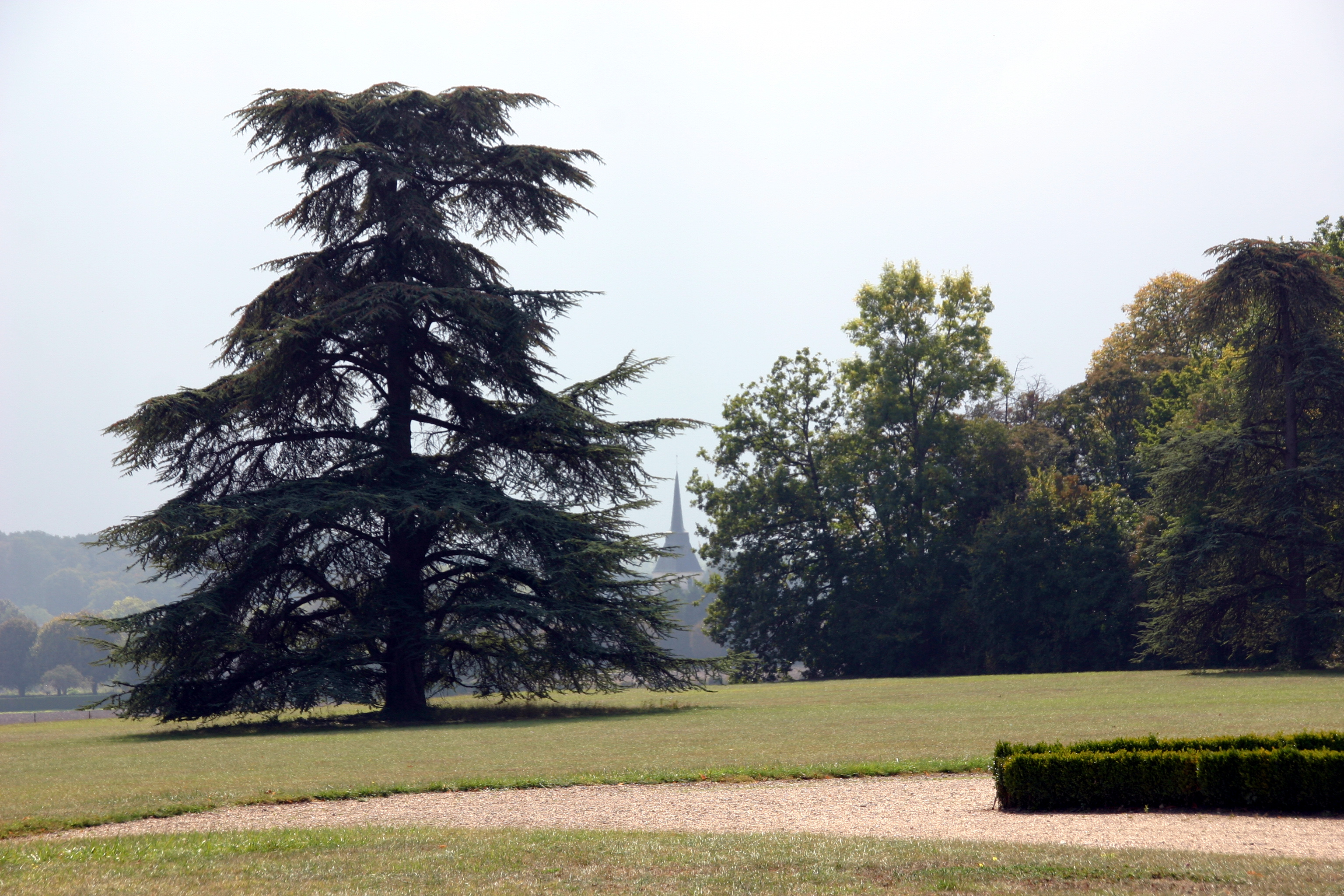 Château de Beauregard